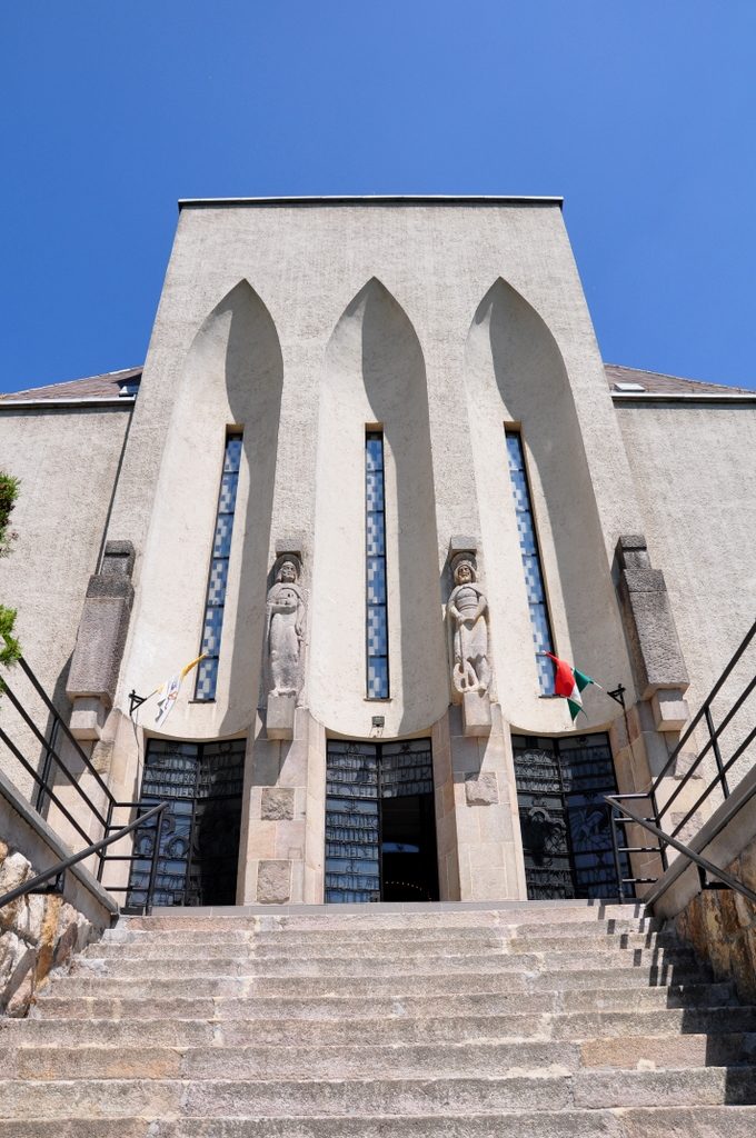 Holy Spirit church in Pesthidegkút, Budapest